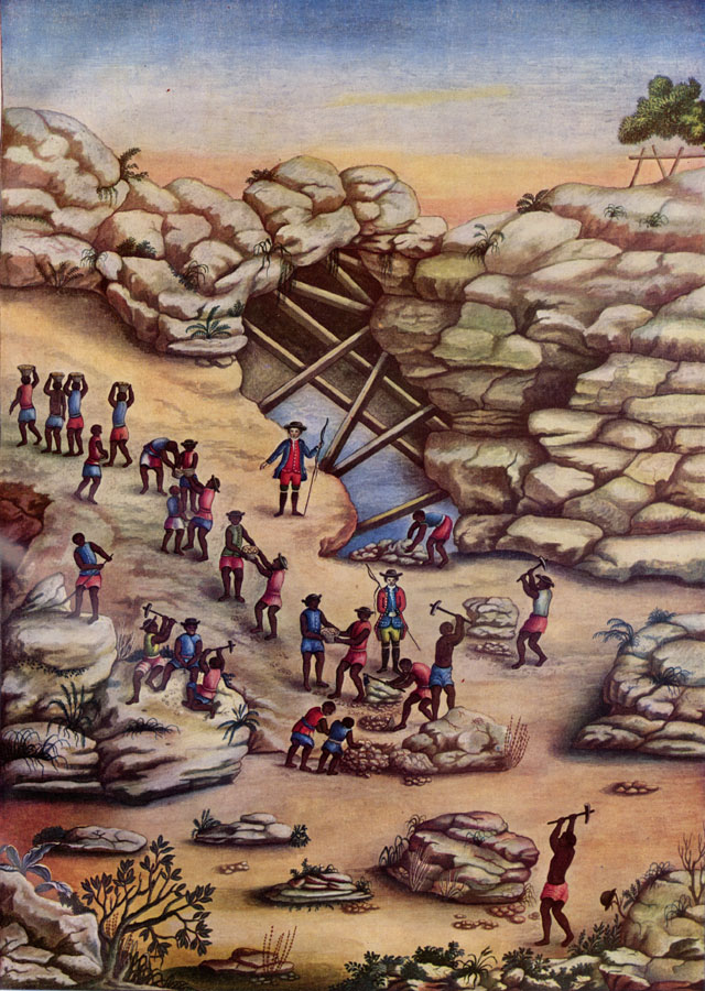 Diamond Mining, Brazil, ca. 1770s